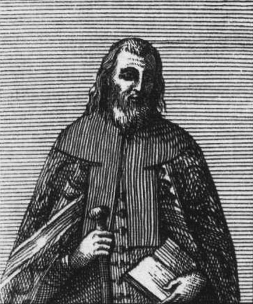 Беларуская (тарашкевіца): Партрэт Язэпа Руцкага